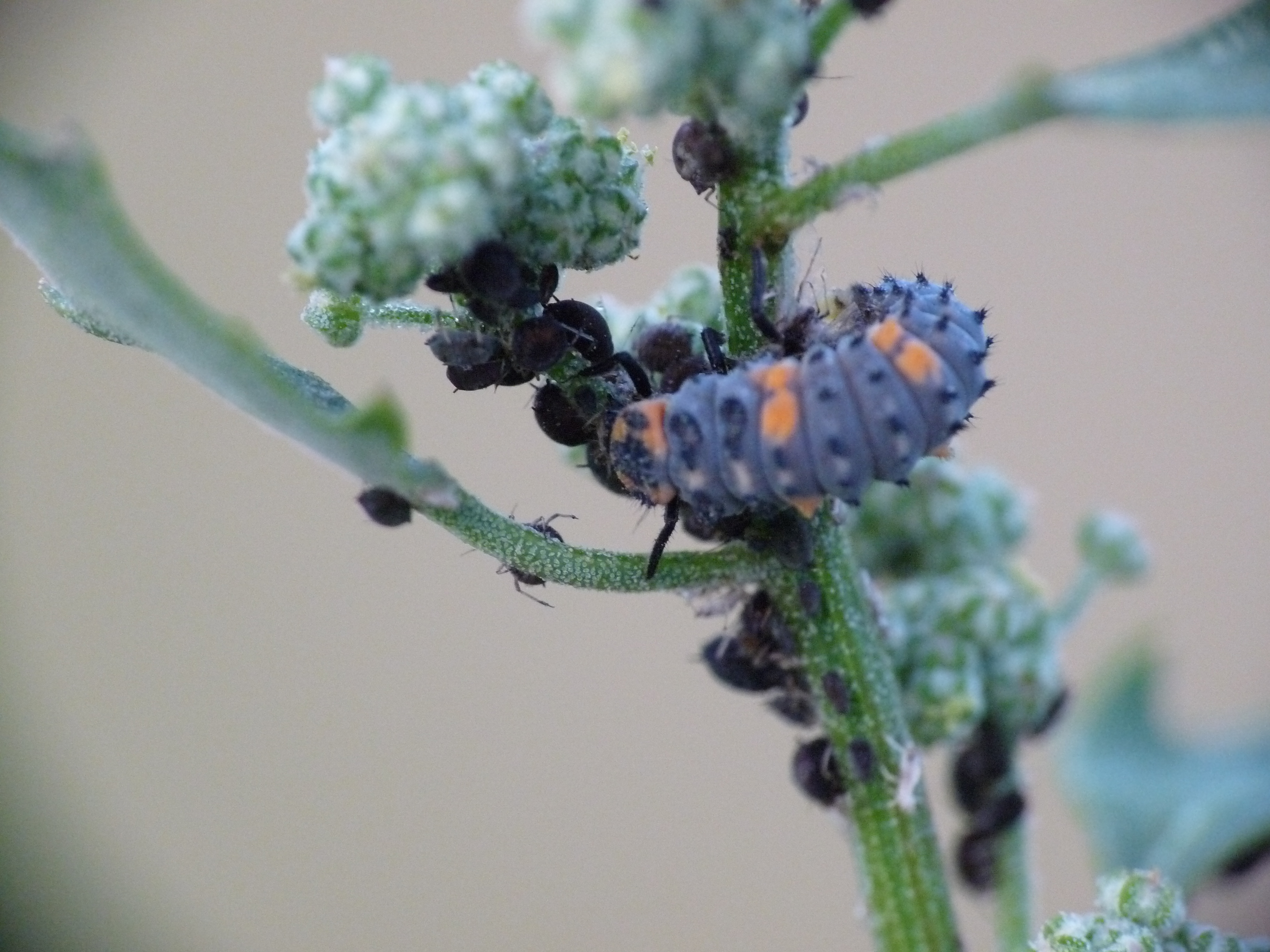 Larwa biedronki siedmiokropki (Coccinella septempunctata) zjadająca mszyce